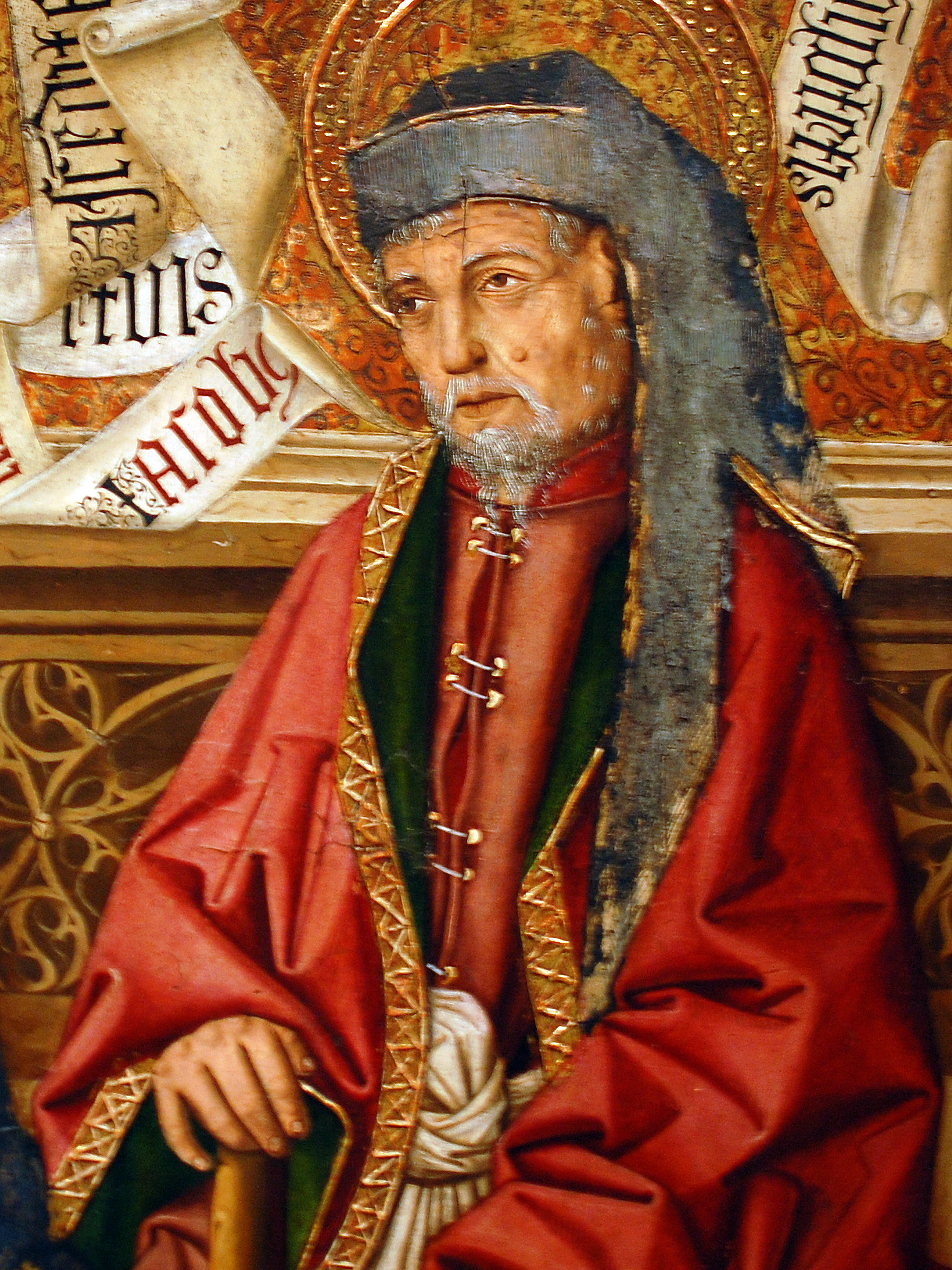 Aragonés: Sant Chaime o Menor